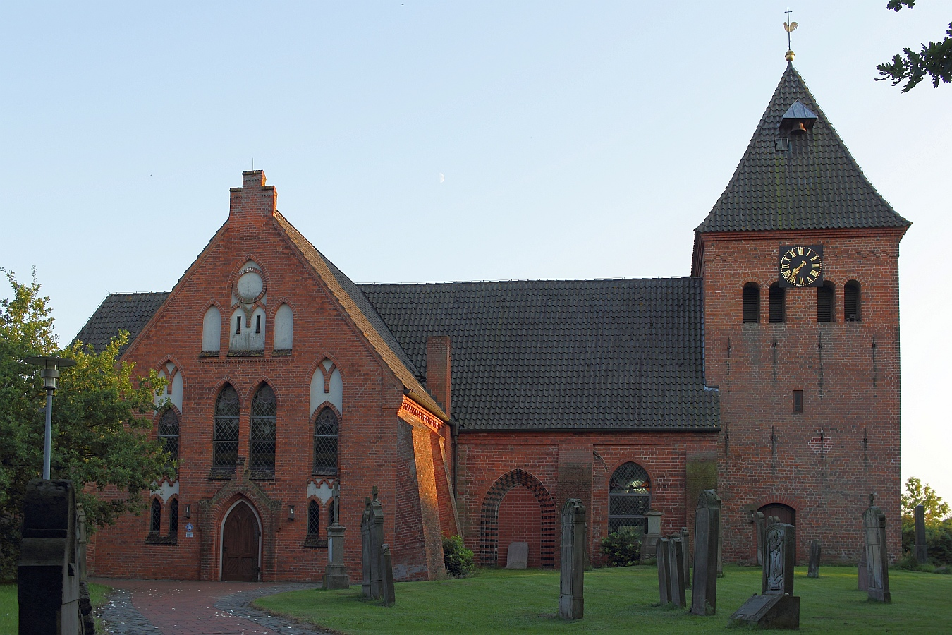 Kirche St. Sigismund mit altem Friedhof in Daverden (Gemeinde Langwedel, Landkreis Verden).